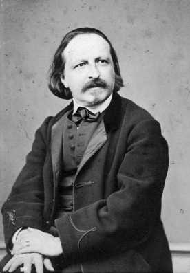 Pulszky Ferenc portréja. Borsos József felvétele